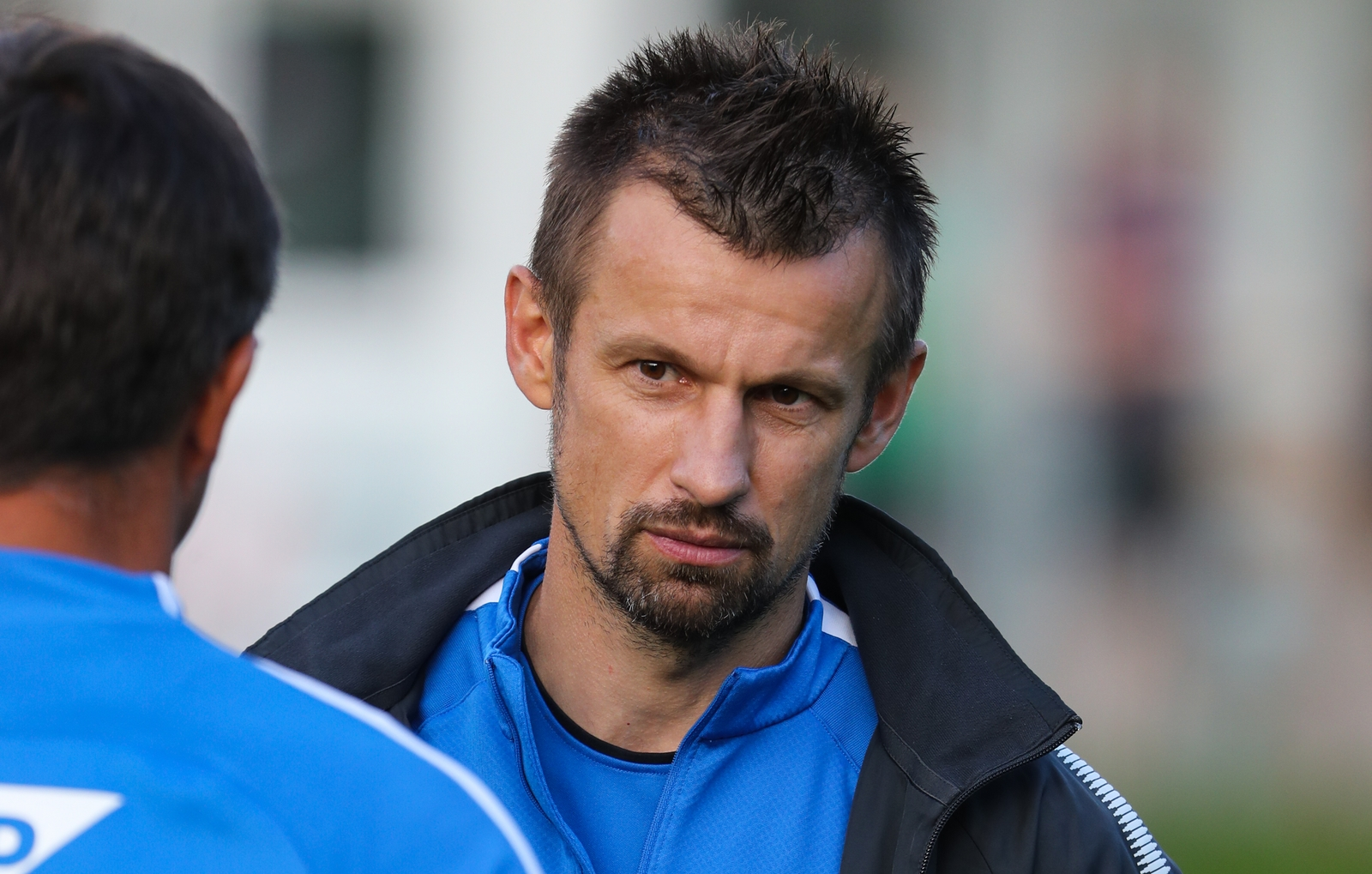 04.07.18. Австрия, Кицбюэль. Вторые «Газпром» — тренировочные сборы: 4 июля, вечерняя тренировка.